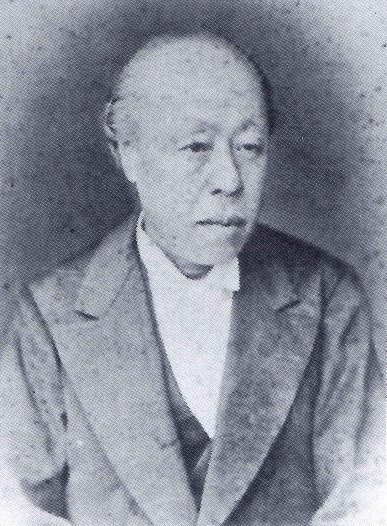 京極朗徹の肖像写真。